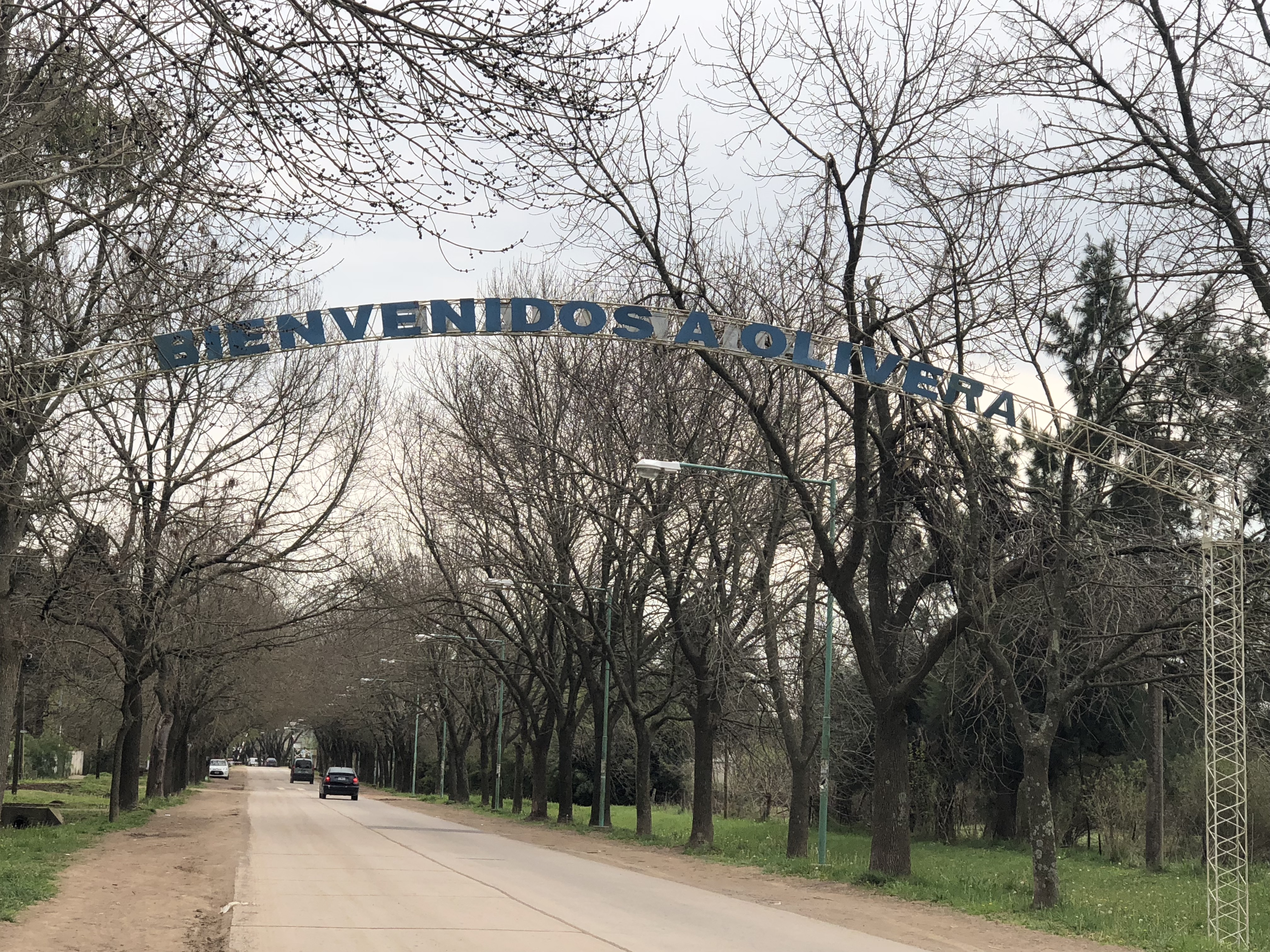 El pueblo se ubica a un costado de la transitada ruta nacional 5, en el Partido de Luján-provincia de Buenos Aires- Tal vez este término se utiliza porque al estar en el medio de dos grandes ciudades, separadas por tan solo 30 km, se encuentra este pequeño y cálido pueblo de unos 1500 habitantes, donde la paz y la tranquilidad invade cada uno de los espacios.